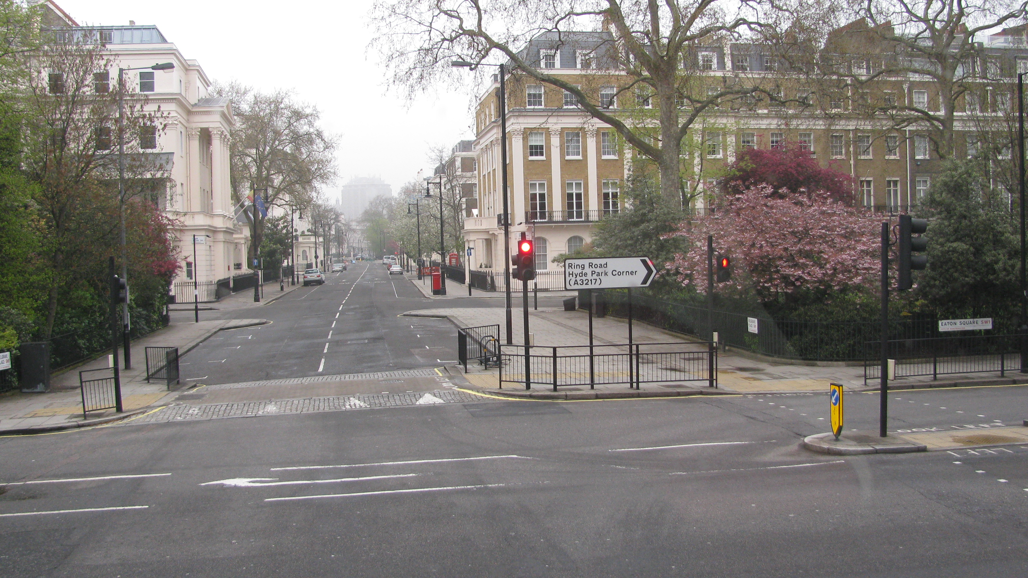 London